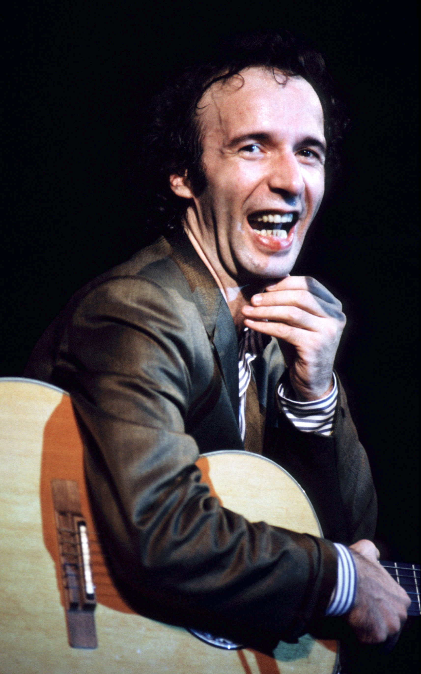 roberto benigni nel 1990